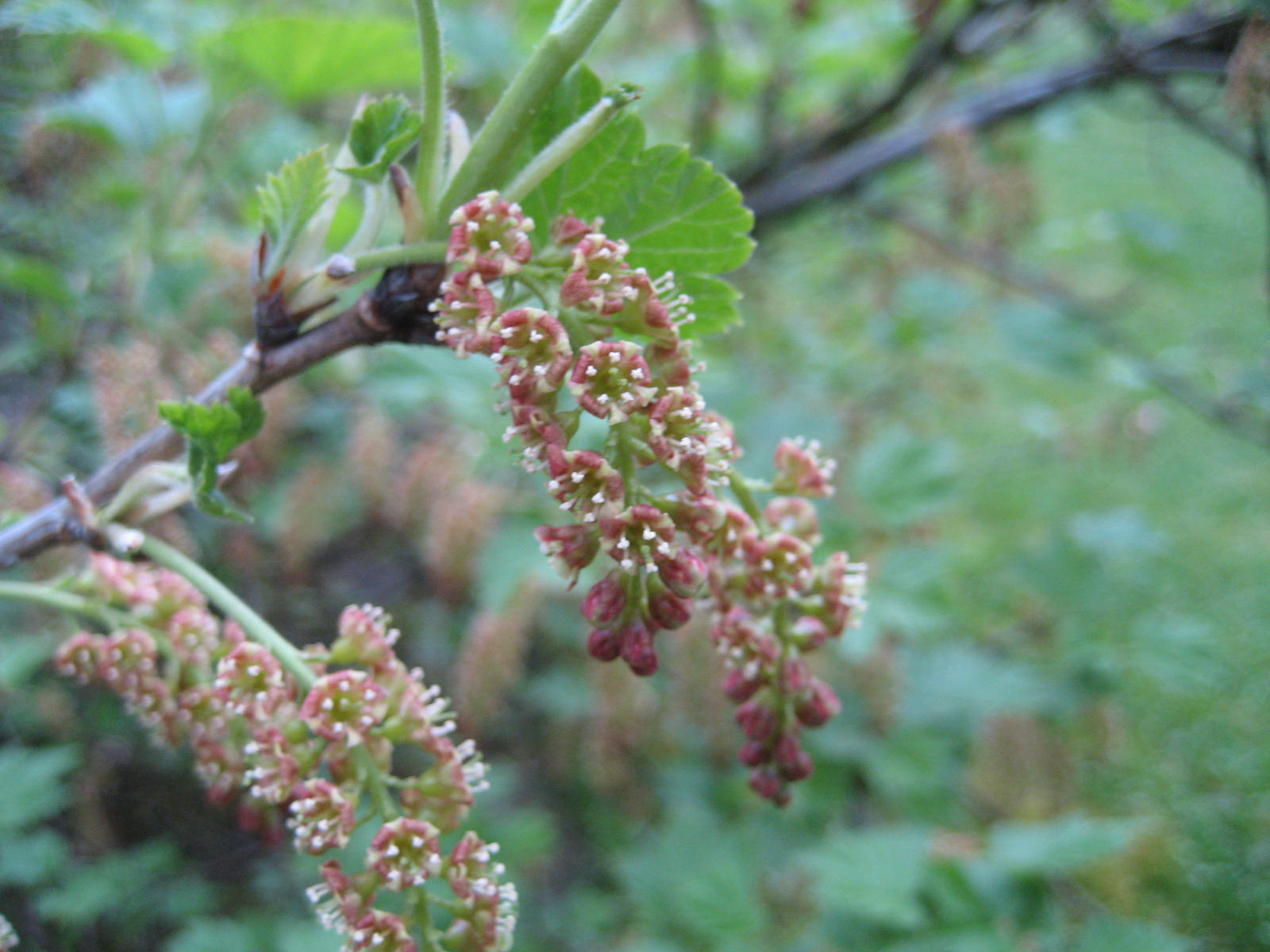 Ribes petraeum - Blüte - Bot. Garten Berlin Dahlem